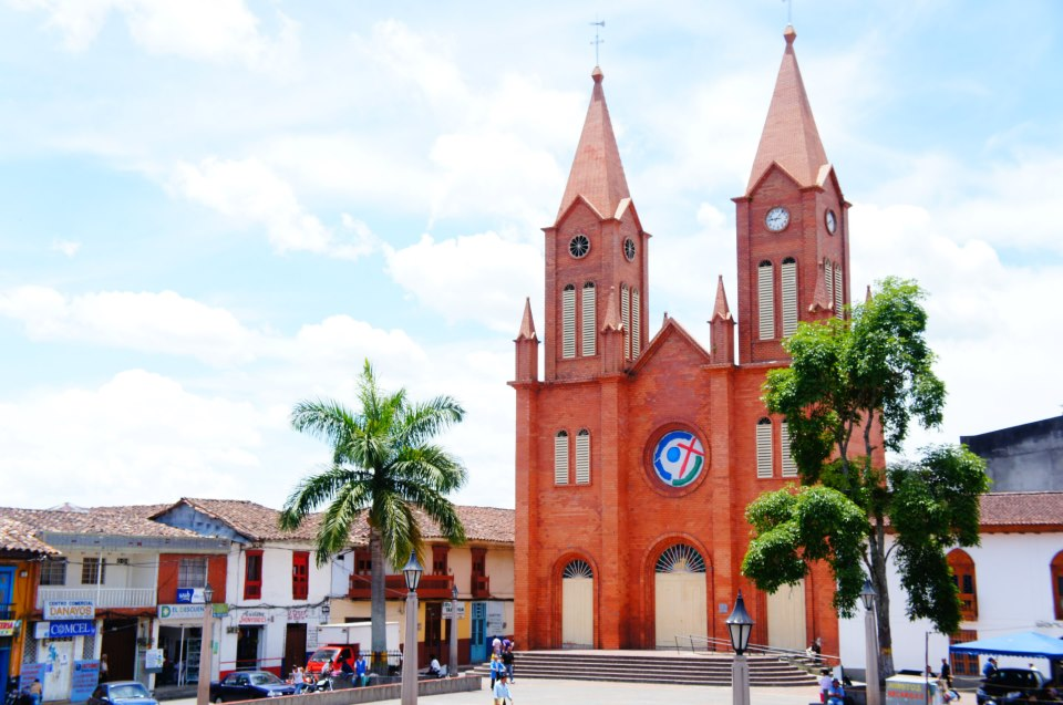 Plaza Mariscal Robledo antes de su remodelación del año 2015 y Parroquia de Santa Bárbara de Anserma Caldas.